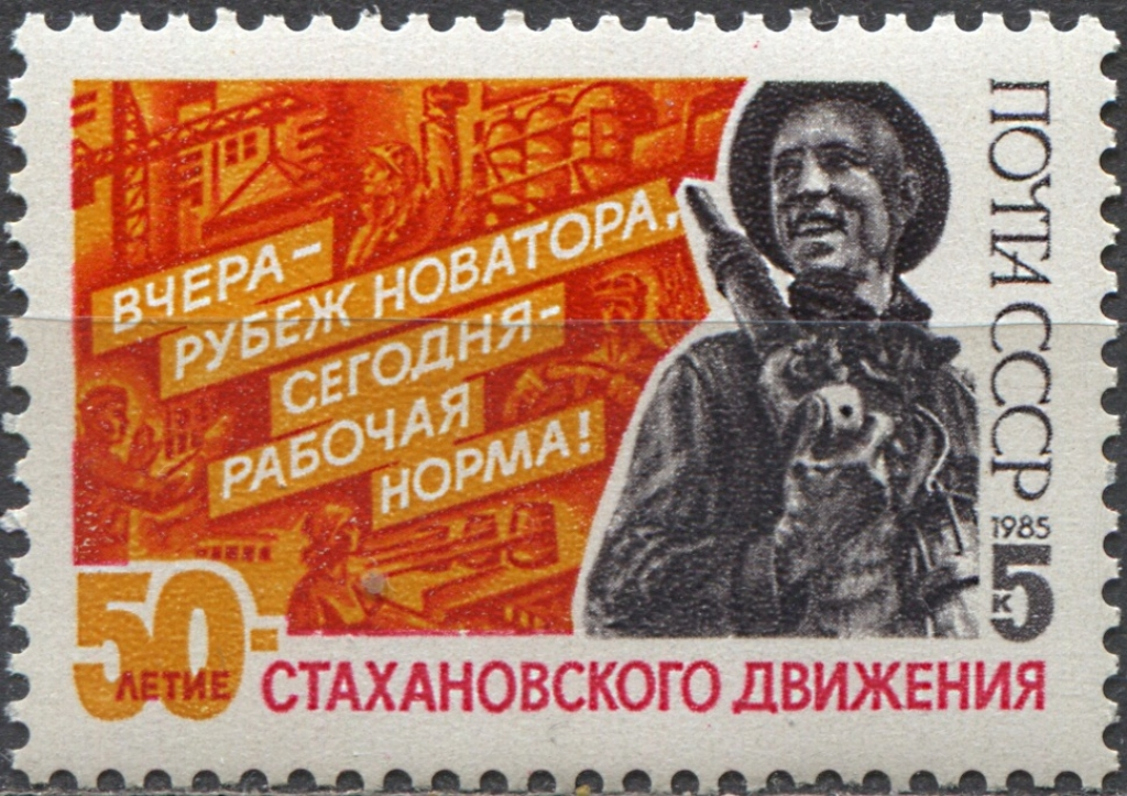 Почтовая марка СССР «К 50-летию стахановского движения». А.Г.Стаханов в рабочей одежде и с отбойным молотком